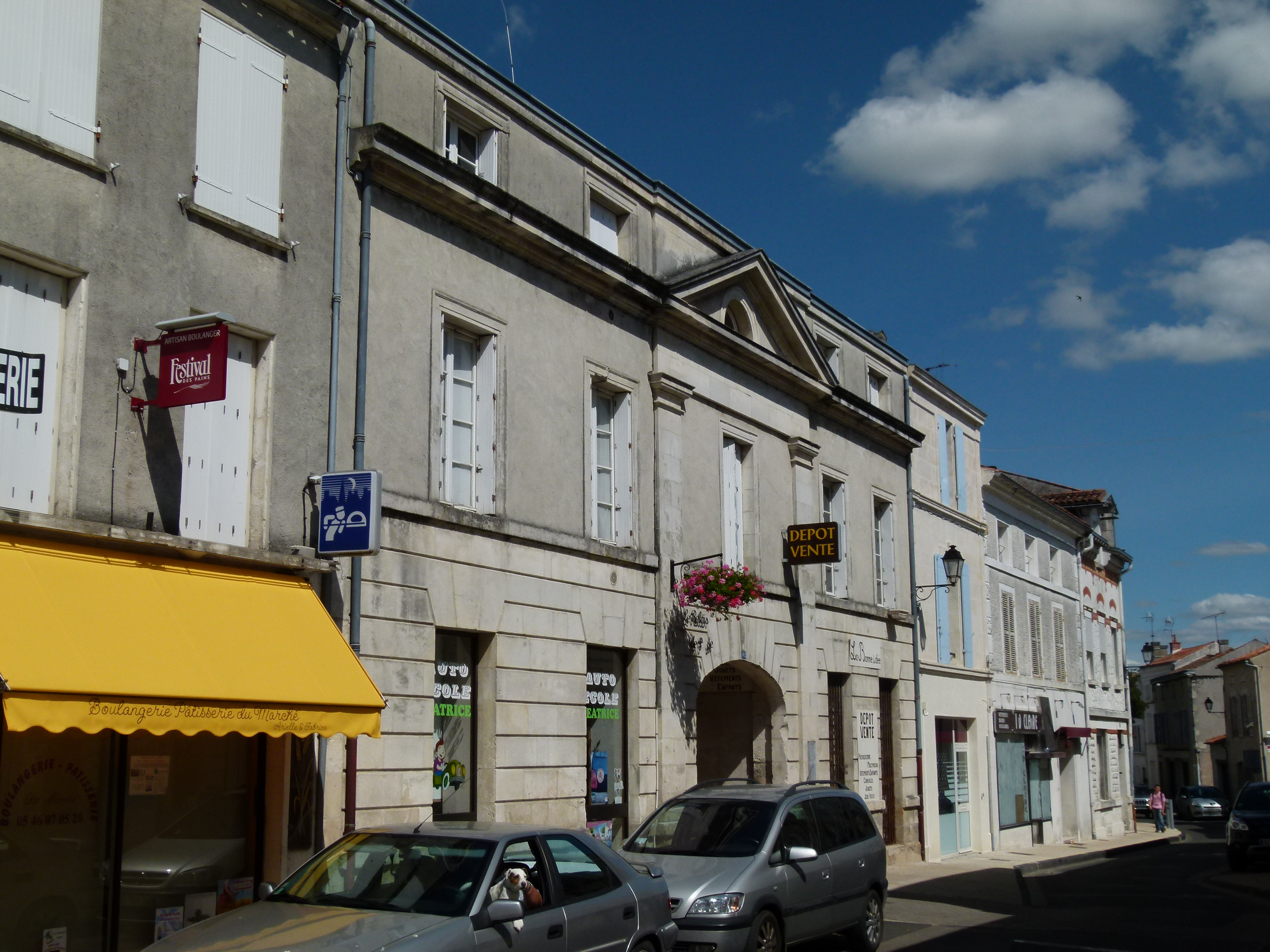 Alignement d'immeubles du XIXe siècle dans la rue Audry-de-Puravault, principale artère urbaine de Surgères.